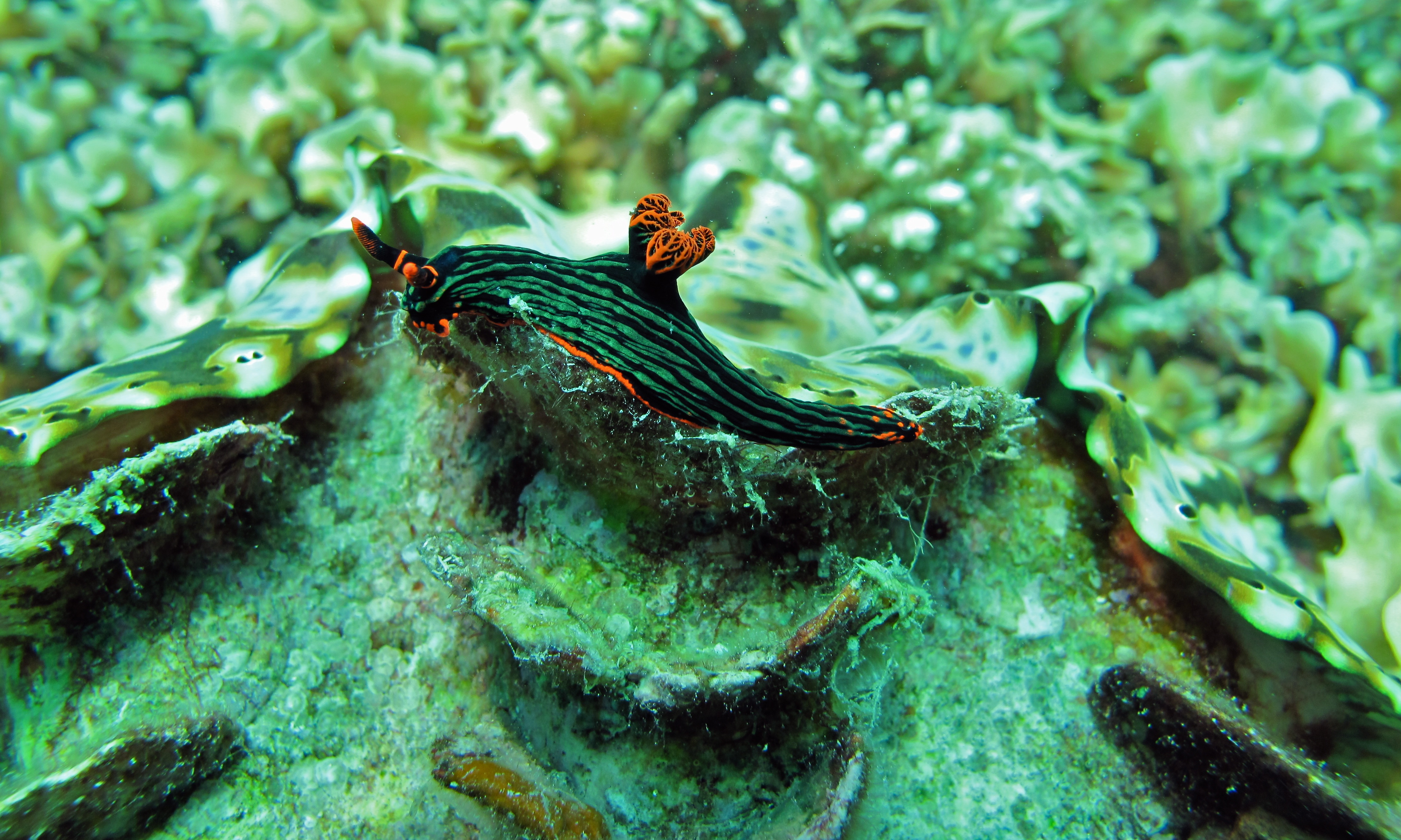 Hawksbill Alley, Pulau Sibuan, Sabah, MALAYSIA